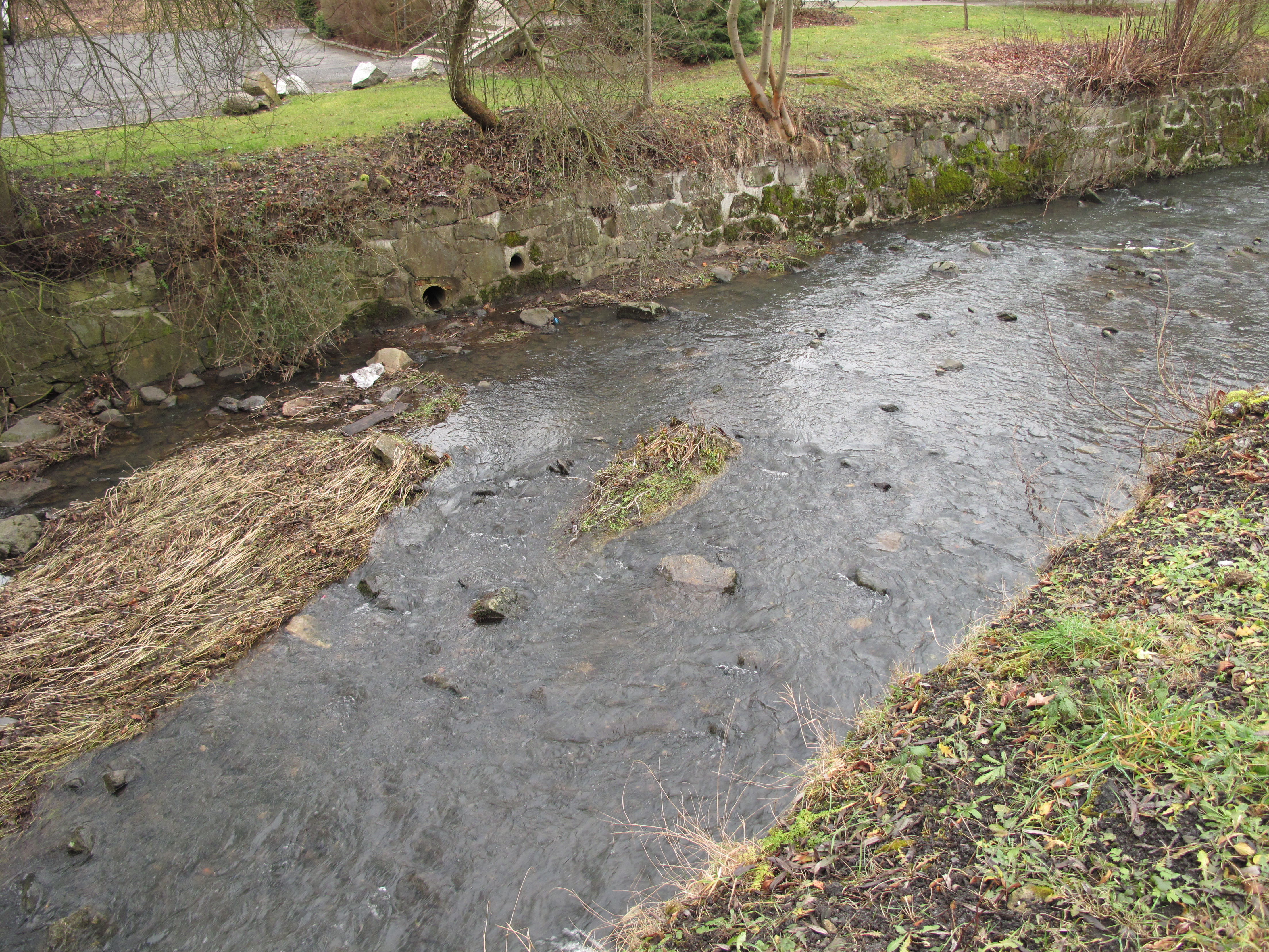 Kyselka. Okres Karlovy Vary, Česká republika.